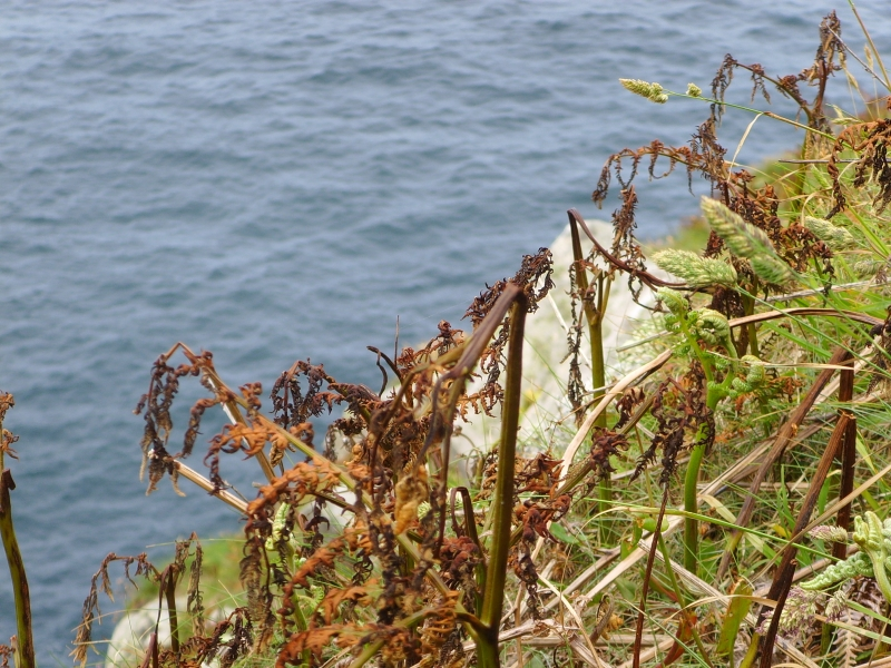 Fougères aigle (Pteridium aquilinum) brûlées par une tempête, pointe du Raz